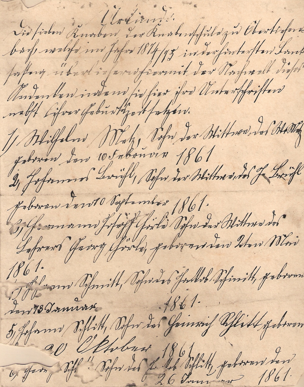 Urkunde als Bekenntnis der „Sieben Knaben zu Obertiefenbach“ vom 16. Juni 1874 zum Limburger Bischof Peter Joseph Blum während des Kulturkampfs - Vorderseite